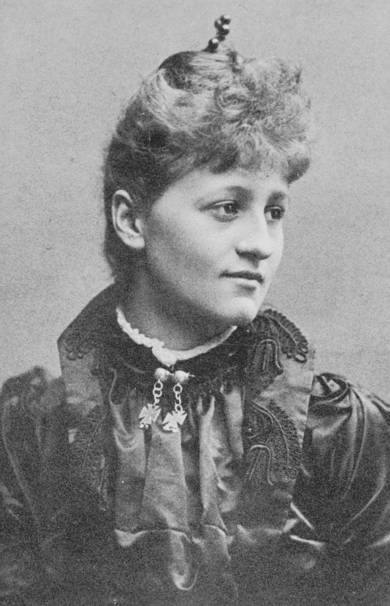 Lotten Olsson, skådespelare vid Svenska teatern 1889